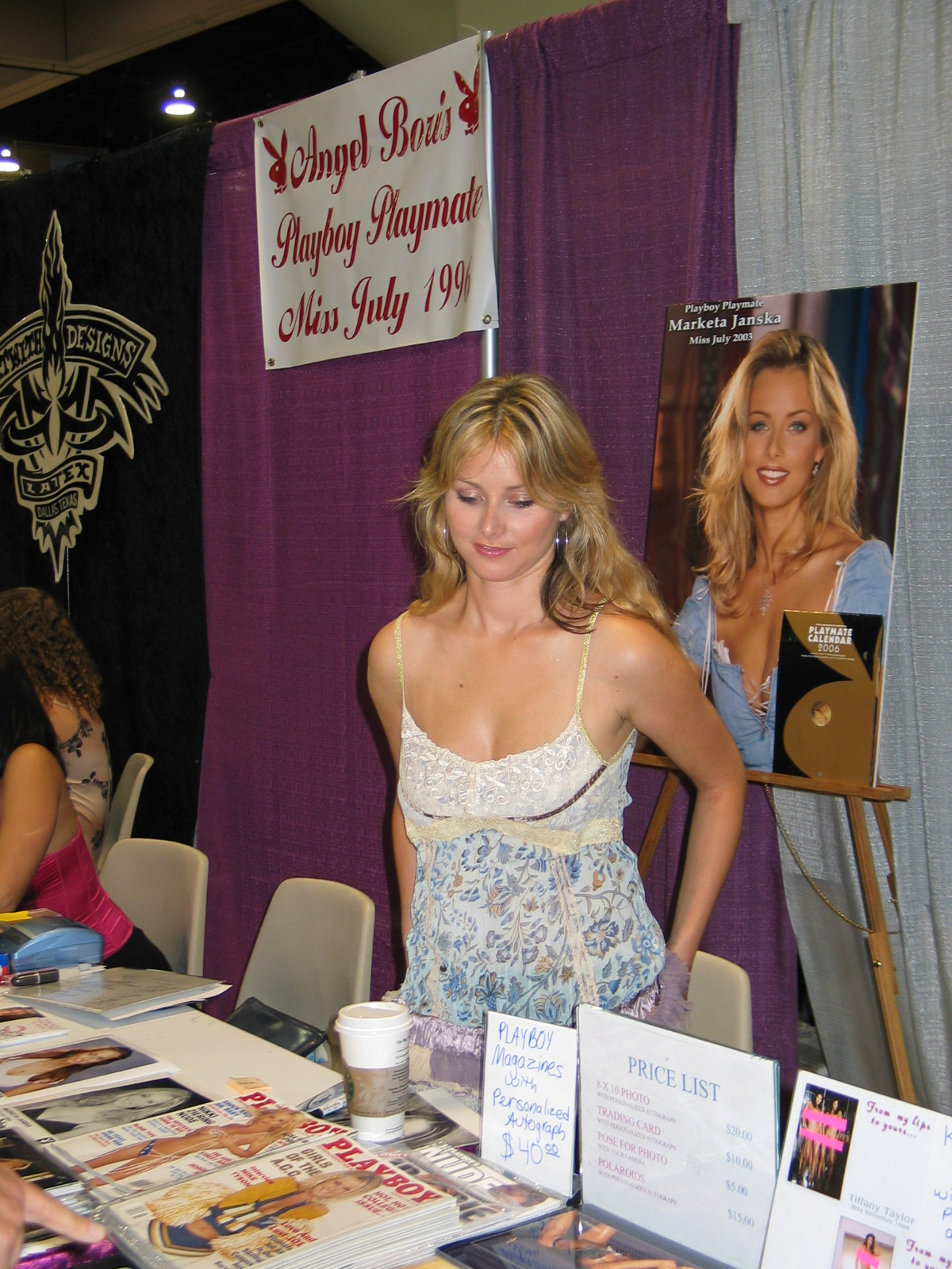 posing for me